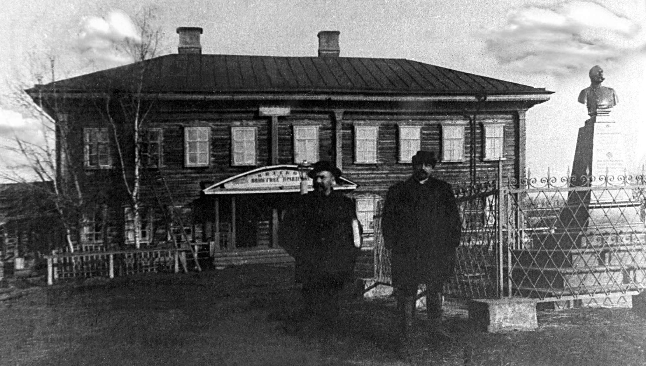 Здание волостного правления в селе Вятское Даниловского уезда Ярославской губернии. Справа ― бюст императору Алексадру II работы скульптора А.М. Опекушина.